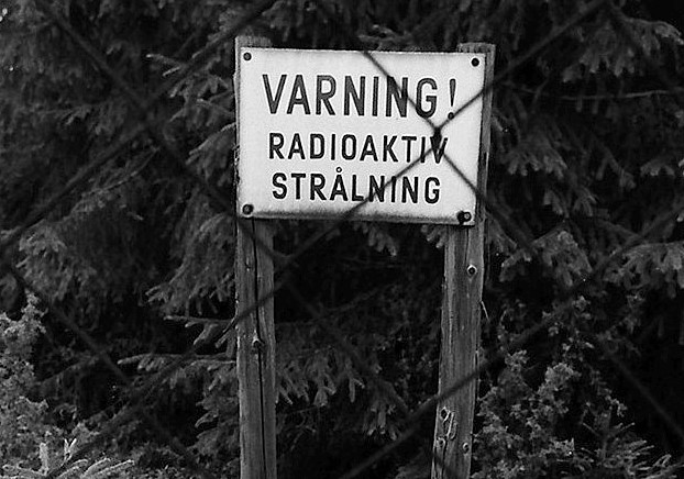 Varning för radioaktiv strålning. Bogesunds slott: Man experimenterade med bekämpnings- och impregneringsmedel och ett område inhägnades även för experiment med radioaktiv strålning som skyltar varnade för.